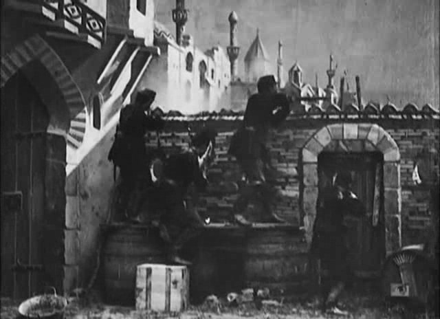 Méliès, La prise de Tournavos (Star Film 106, 1897)